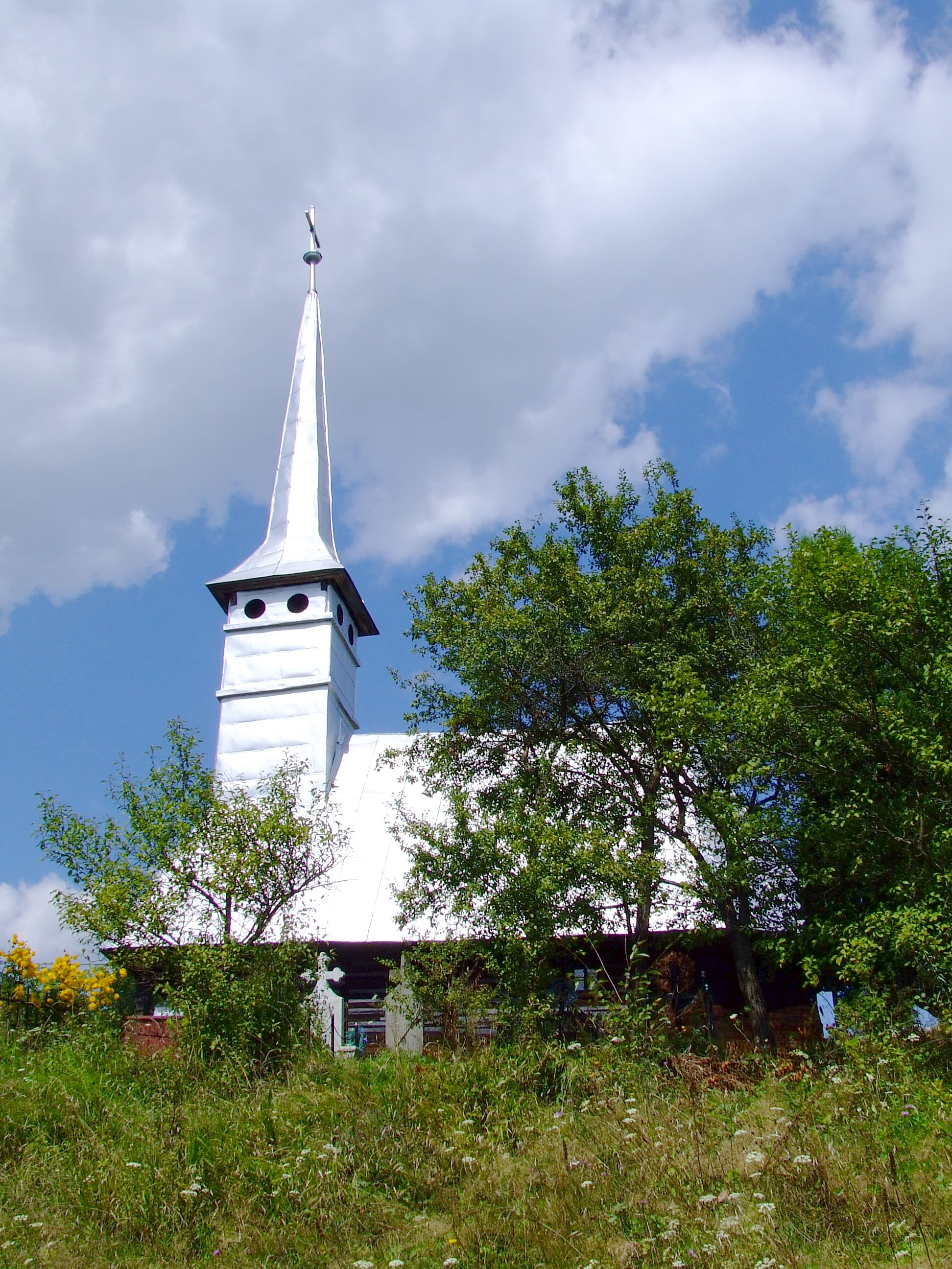 Biserica de lemn din Piroşa, judeţul Sălaj.